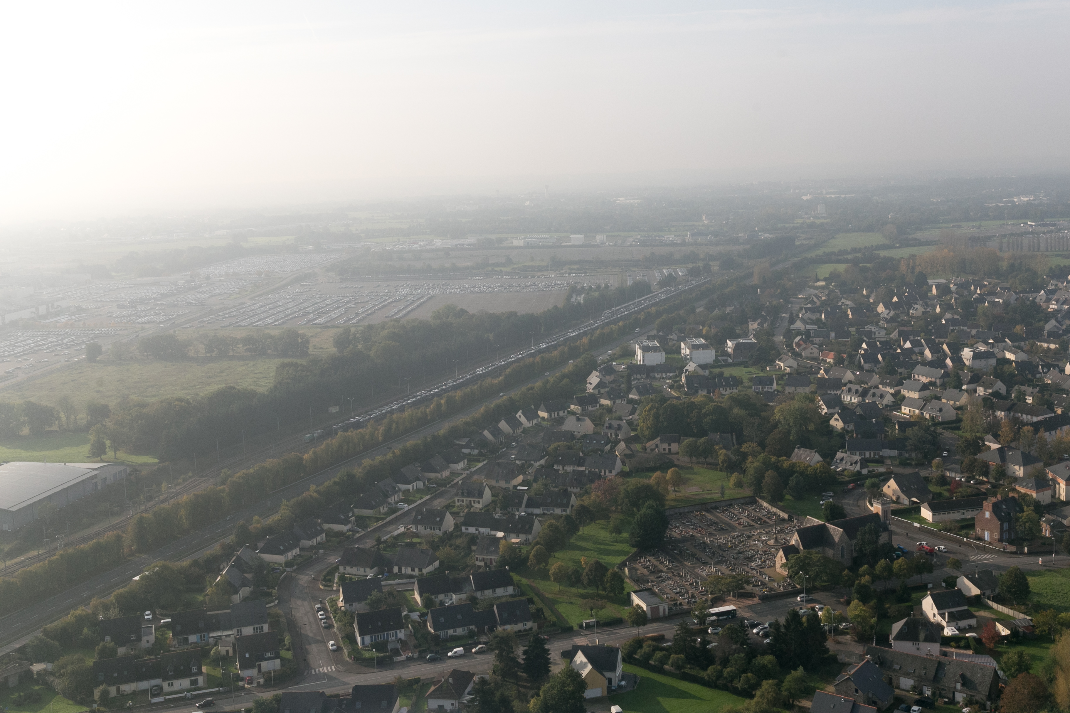 Vue aérienne de Saint-Jacques-de-la-Lande lors d'un vol entre RNS et CDG.